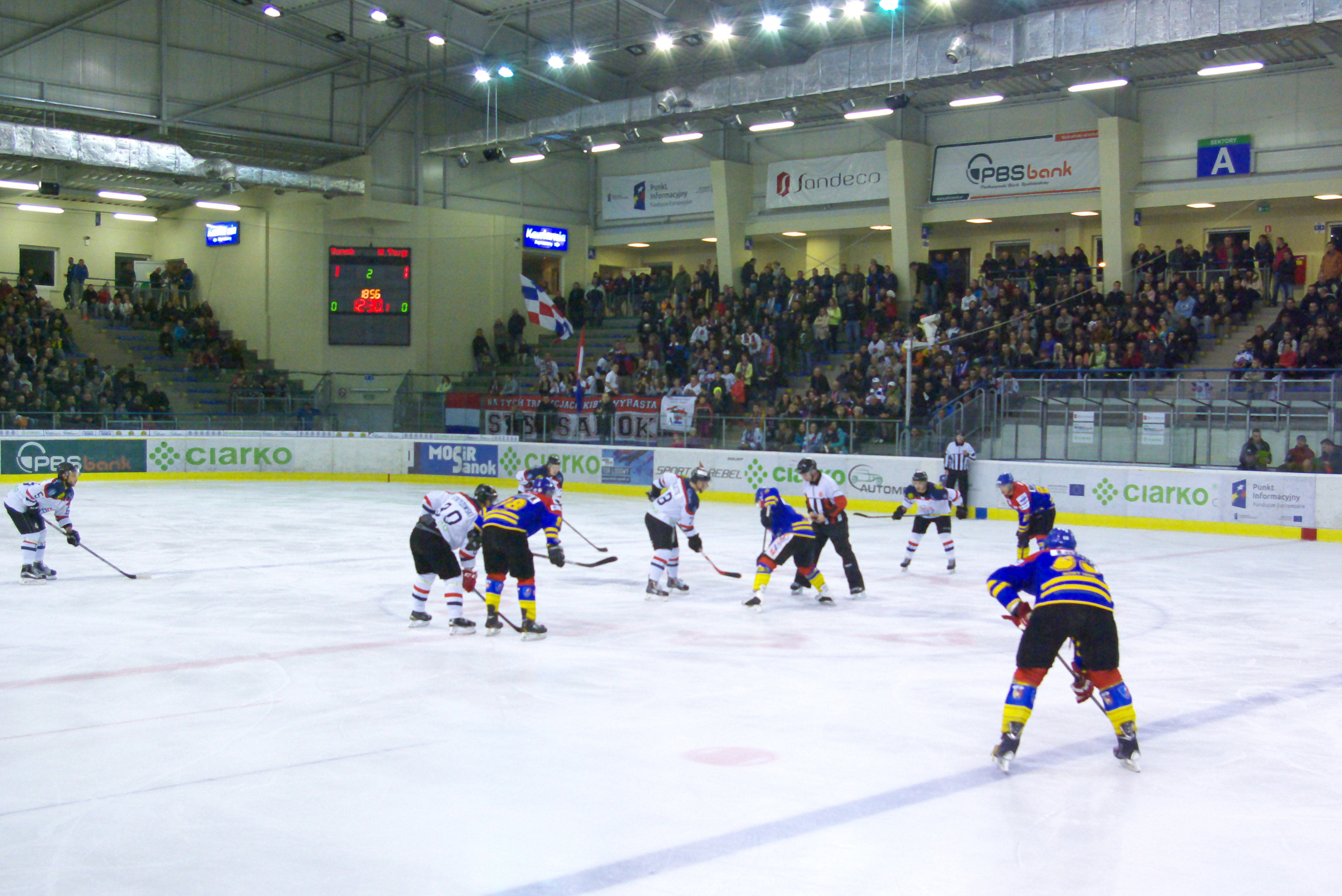 Mecz STS Sanok - Podhale Nowy Targ 1:4 (Arena Sanok, 23 października 2015).